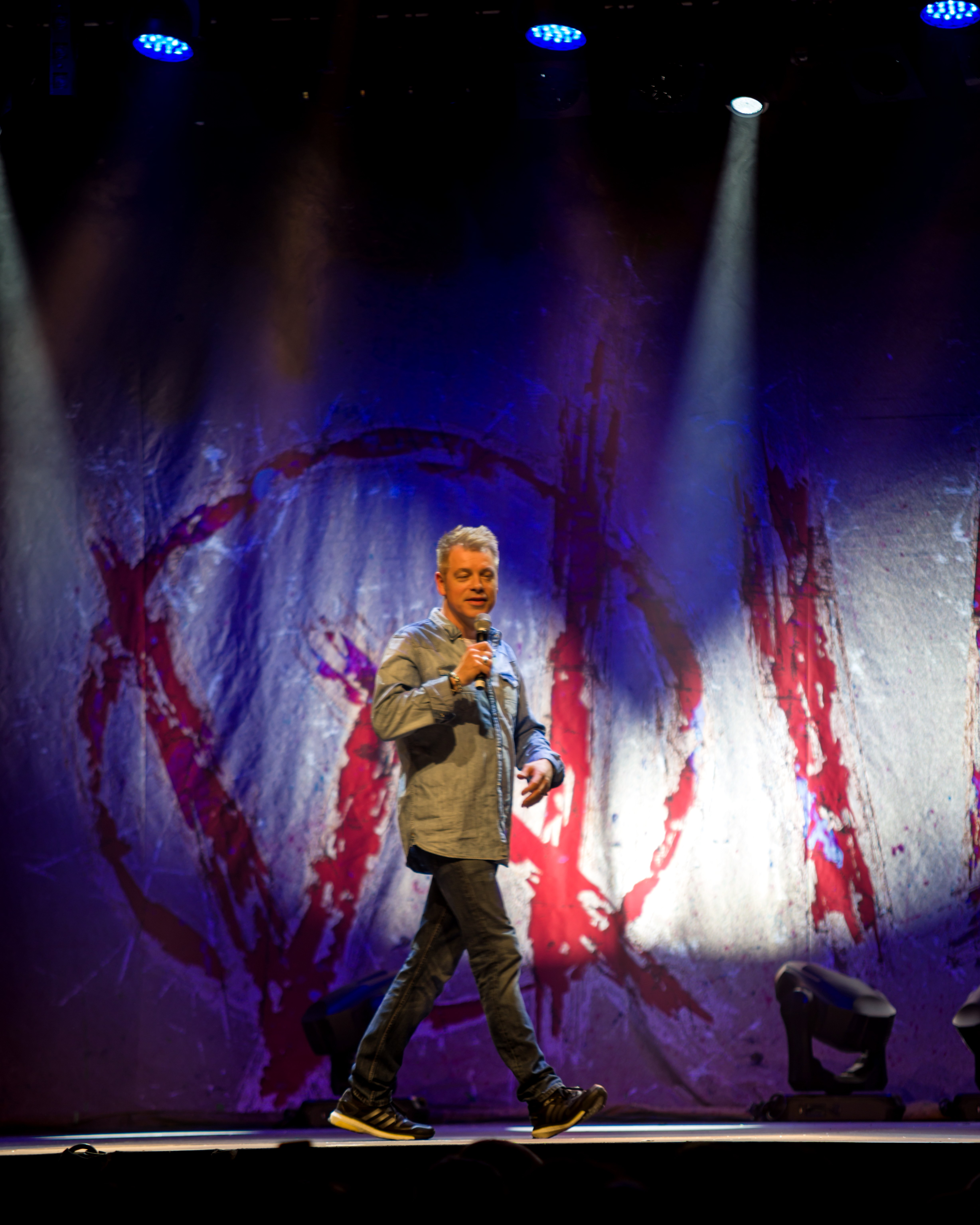 Bilder vom Zelt Musik Festival 2017 in Freiburg im Breisgau Michael Mittermeier "Wild" (ZMF 2017)